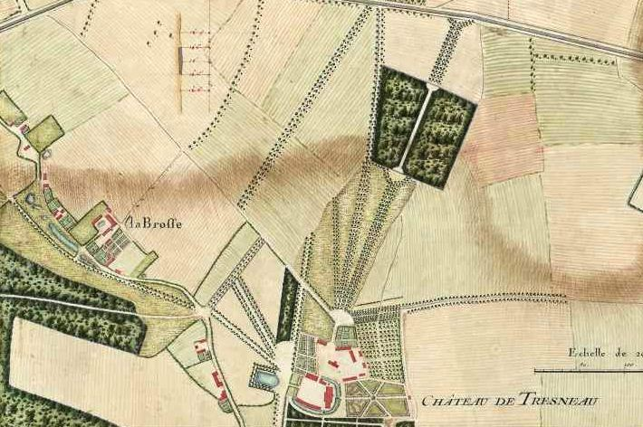 Le château de Tresneau, son parc et sa ferme